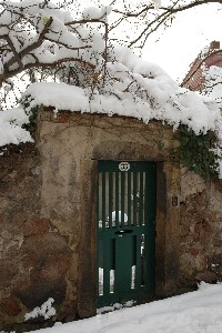 Altes Eingangstor auf der Weinbergstrasse